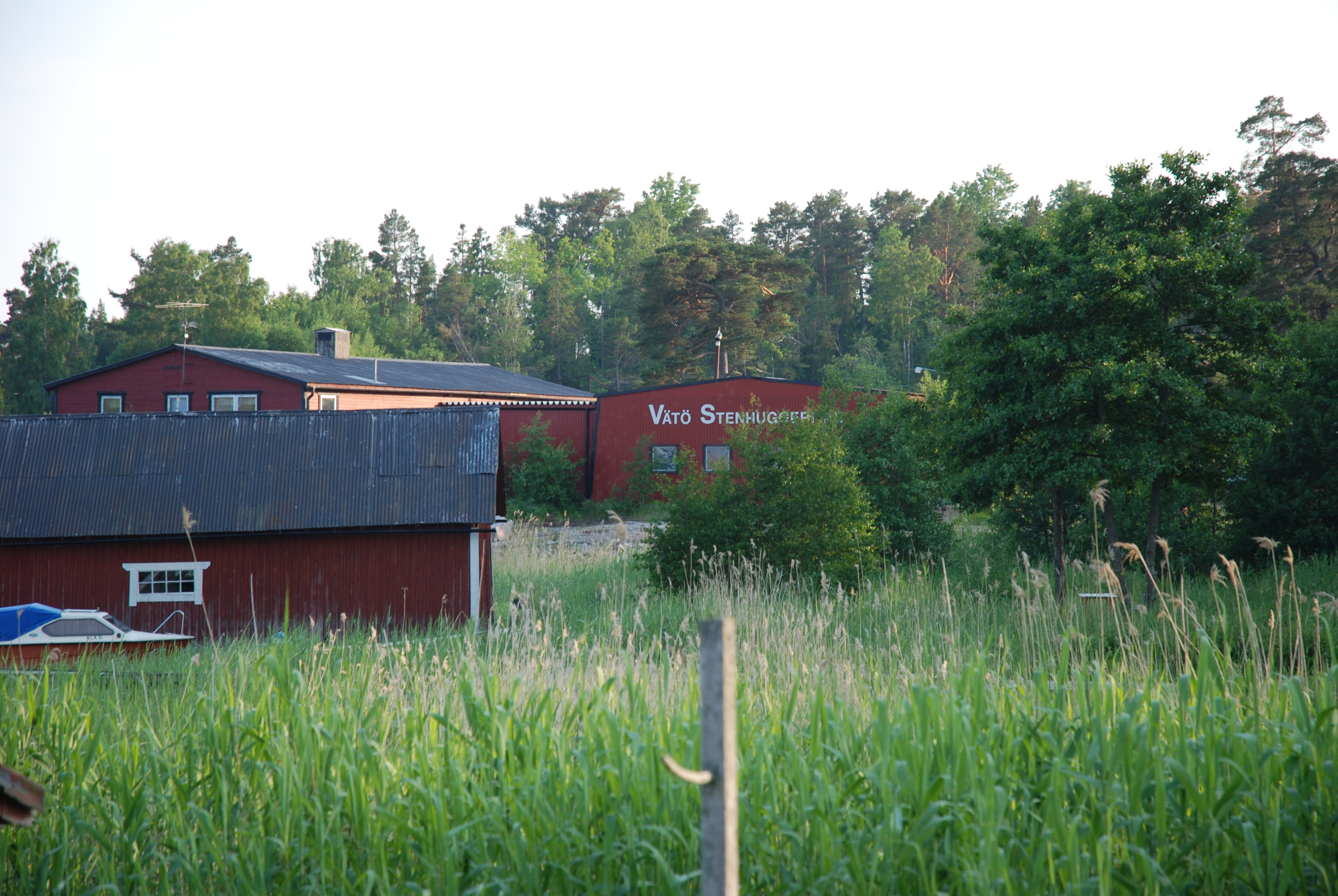 Vätö Senhuggeri, Karlsängen, Vätö